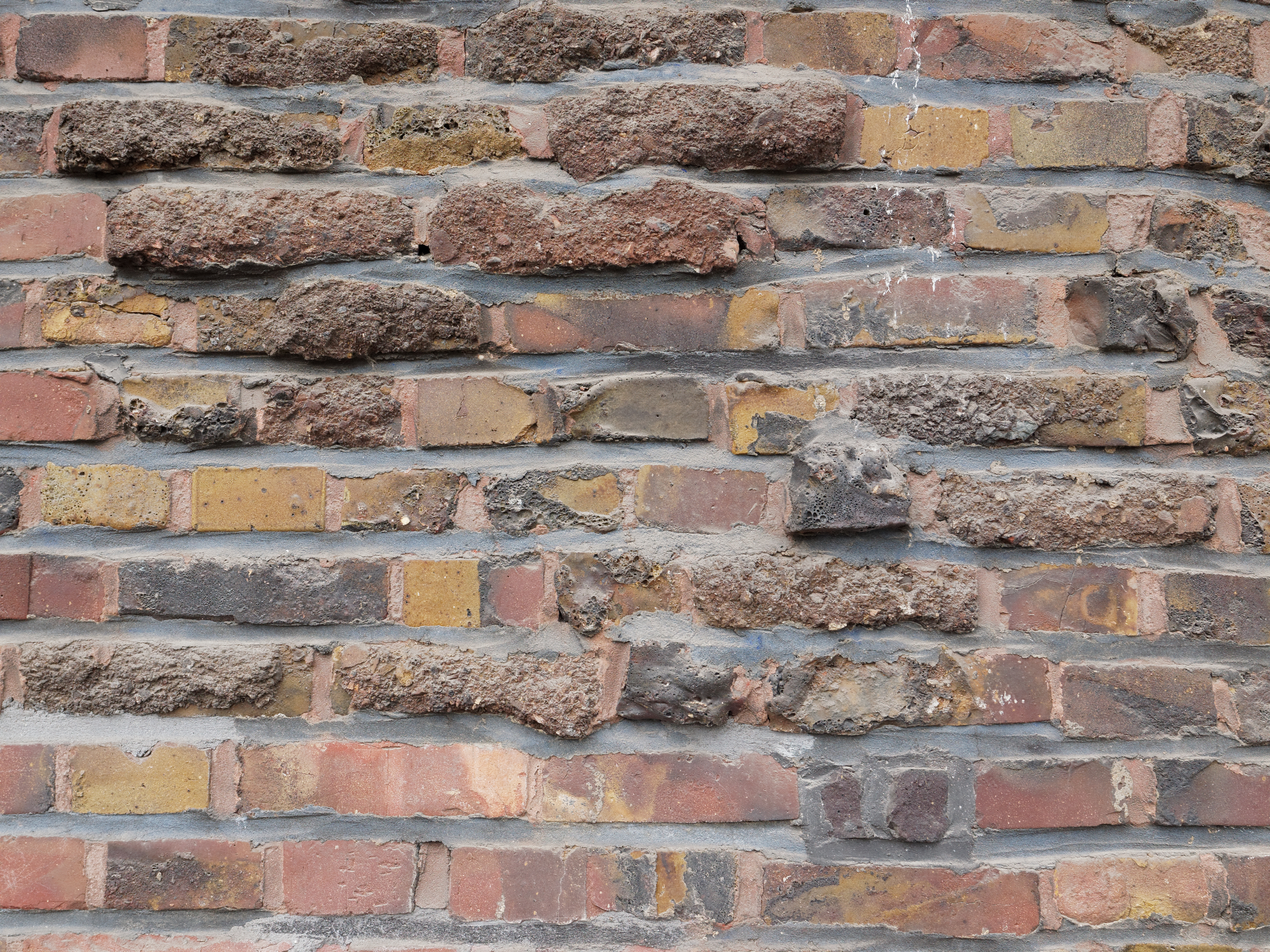 Backstein- oder Klinkerexpressionismus als Gestaltungelement an einer Hauswand durch fehlgebrannte Klinker, gesehen in Herne. Das Wohngebäude, der Rote Block, ist in der Denkmalliste von Herne unter der Nr. 87 eingetragen.